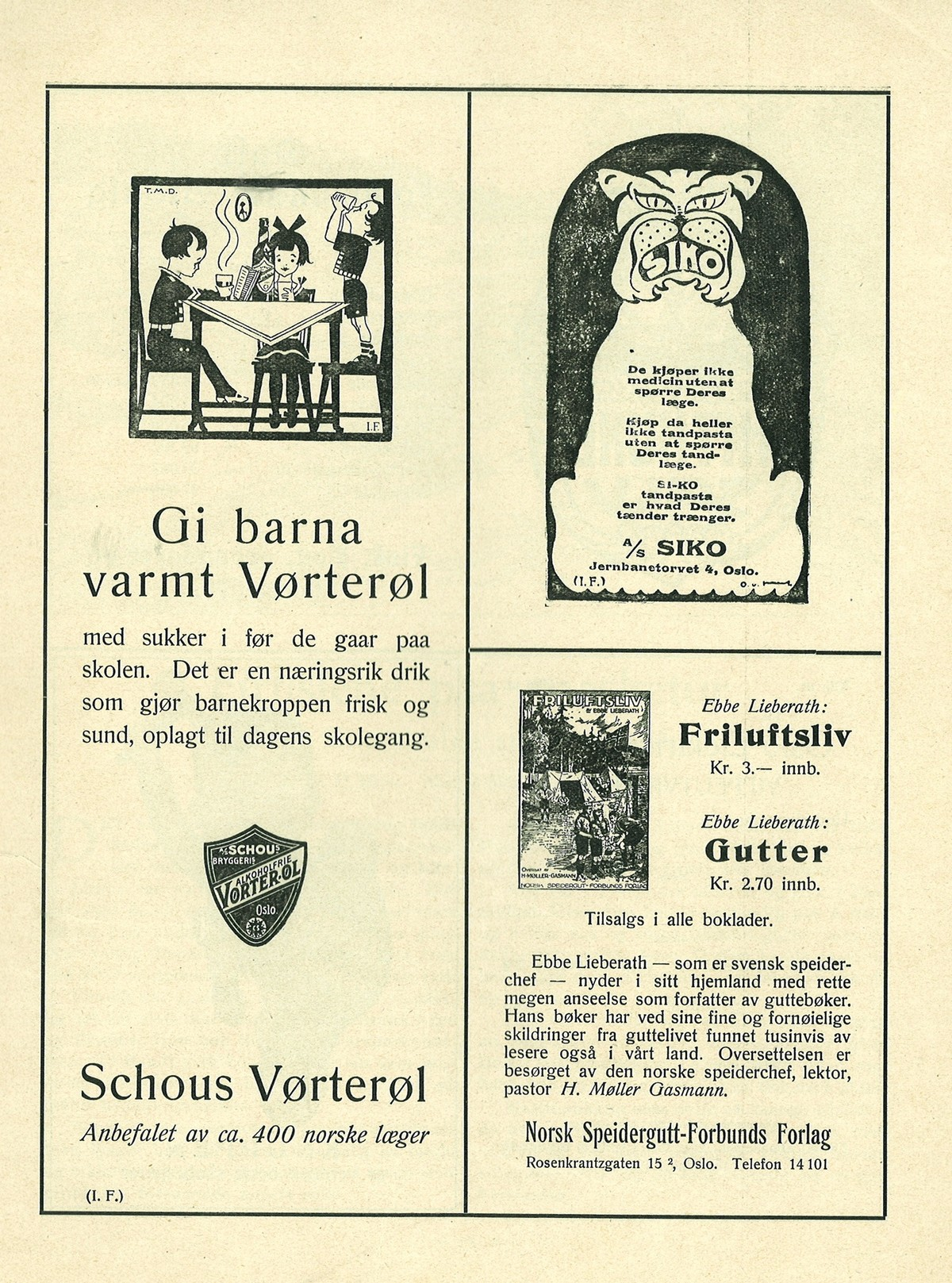 Annonse frå Julehilsen 1925